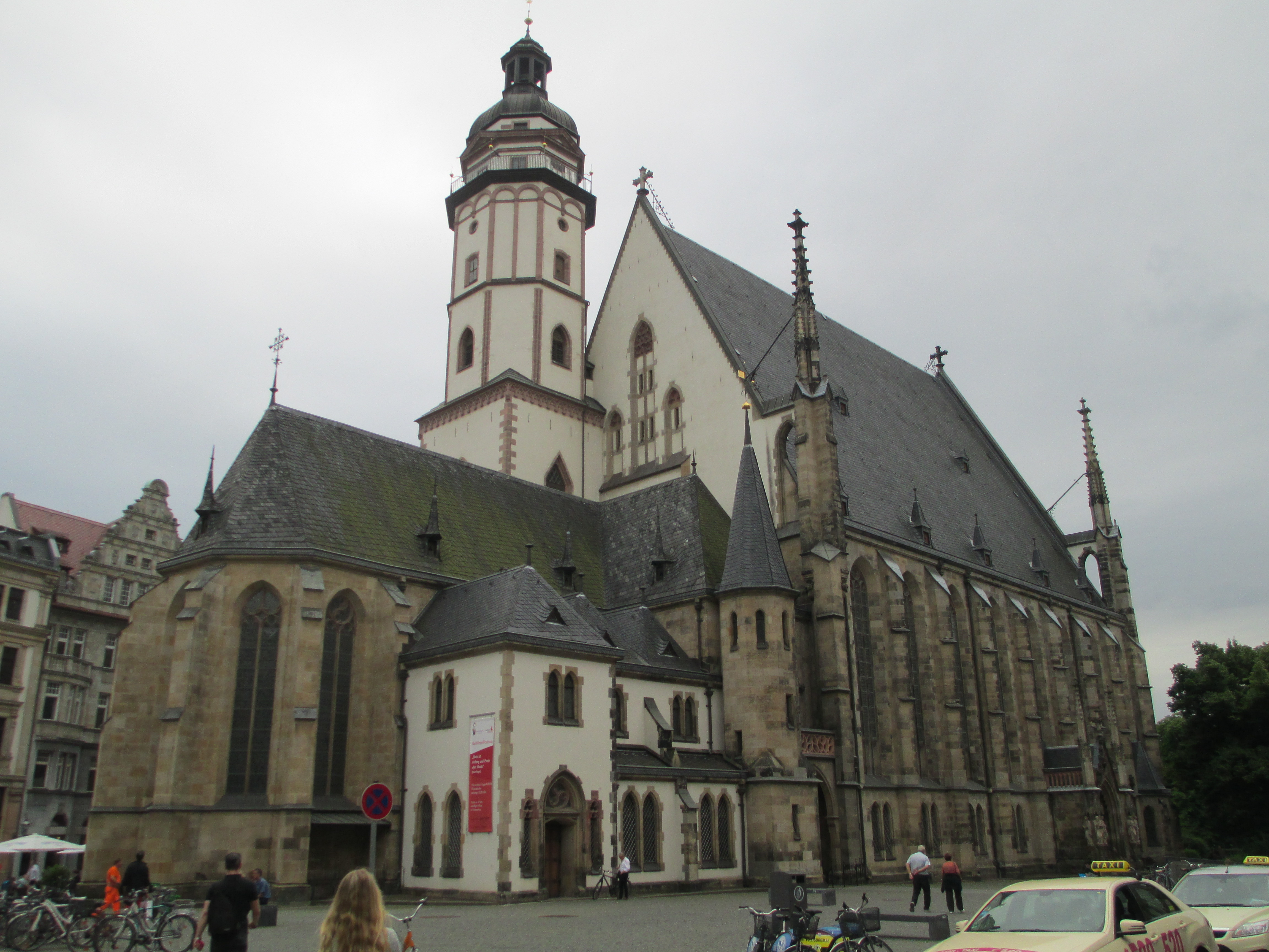 כנסיית תומאס בלייפציג - מראה כללי